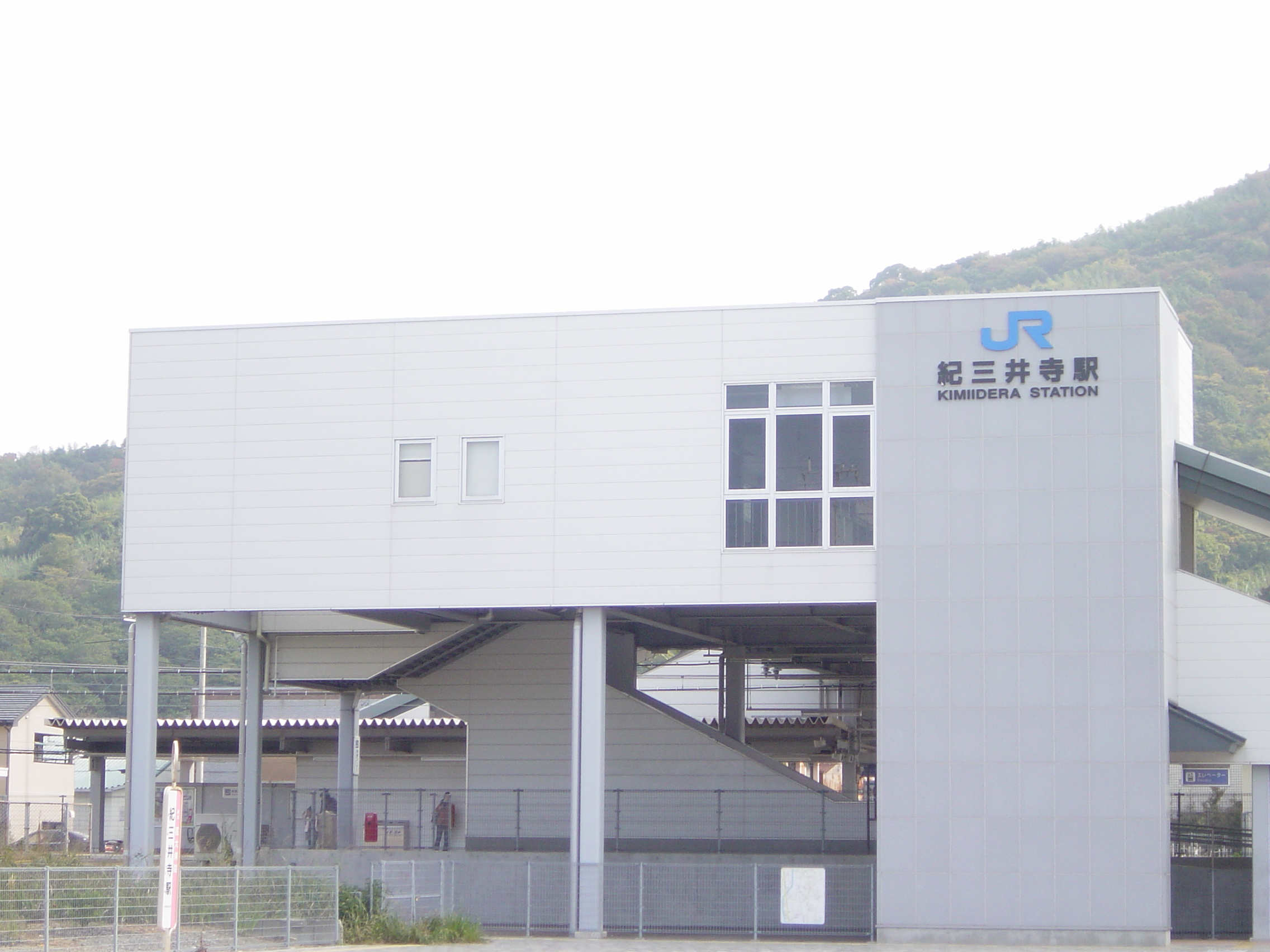 JR西日本紀三井寺駅